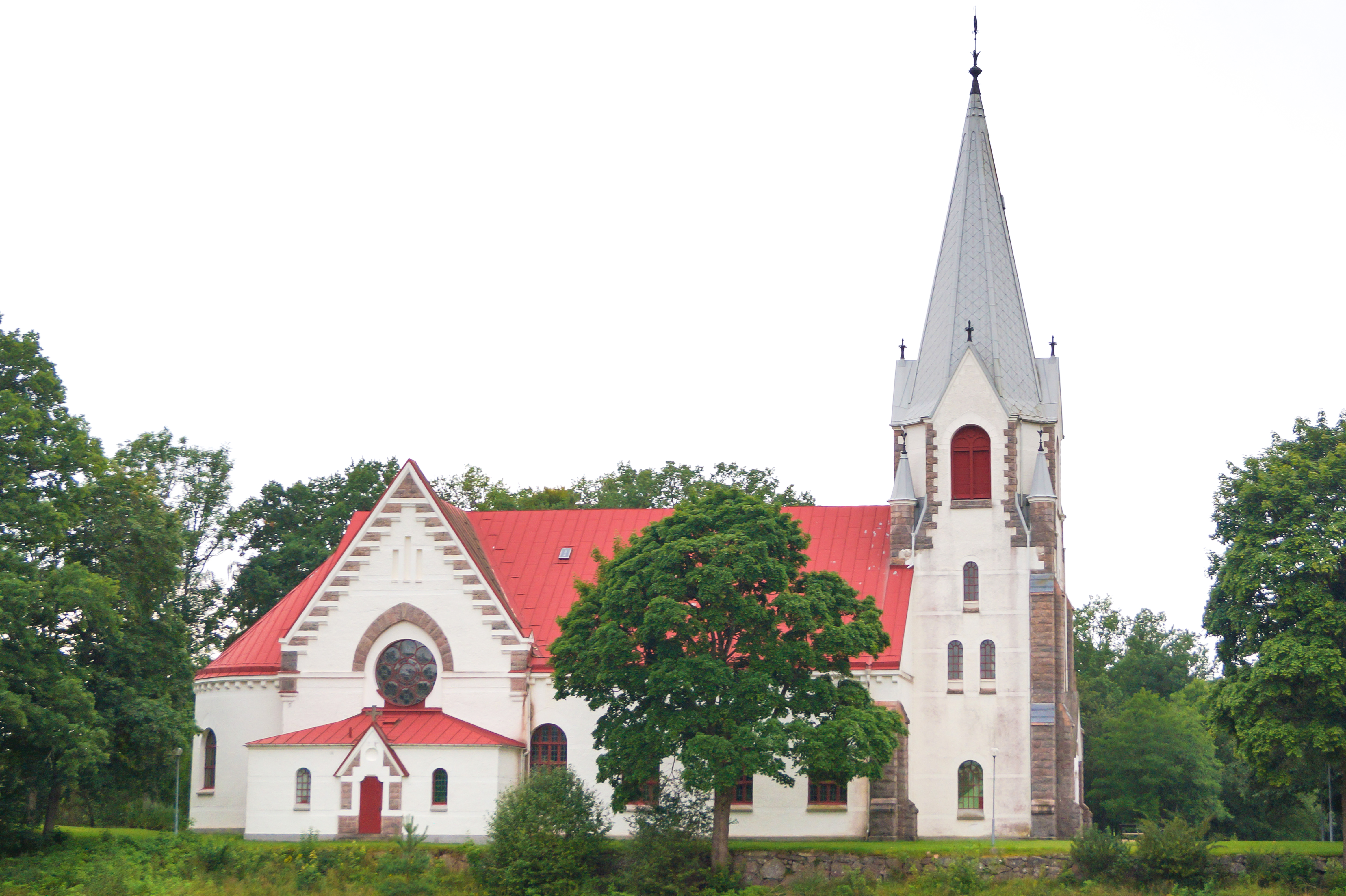 Kyrka i Kalv, Kindaholms församling, Svenljunga kommun.